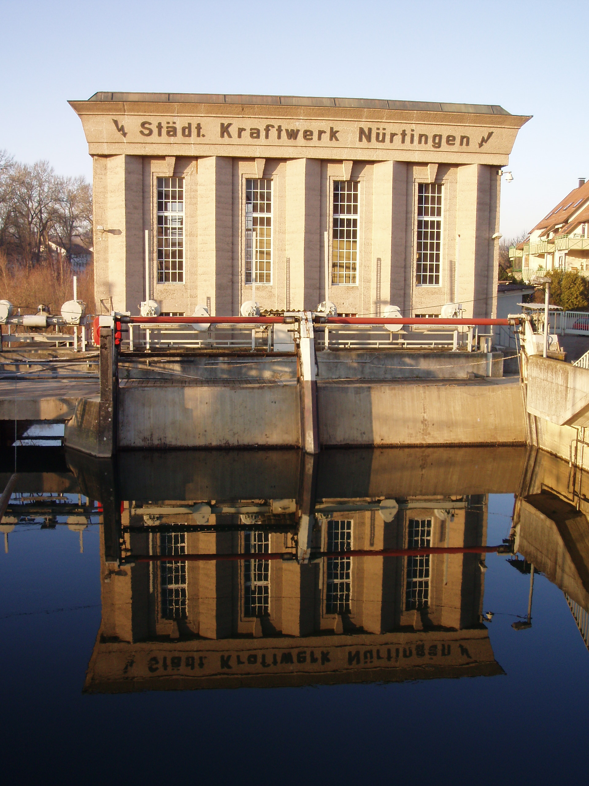 Städtisches Kraftwerk Nürtingen